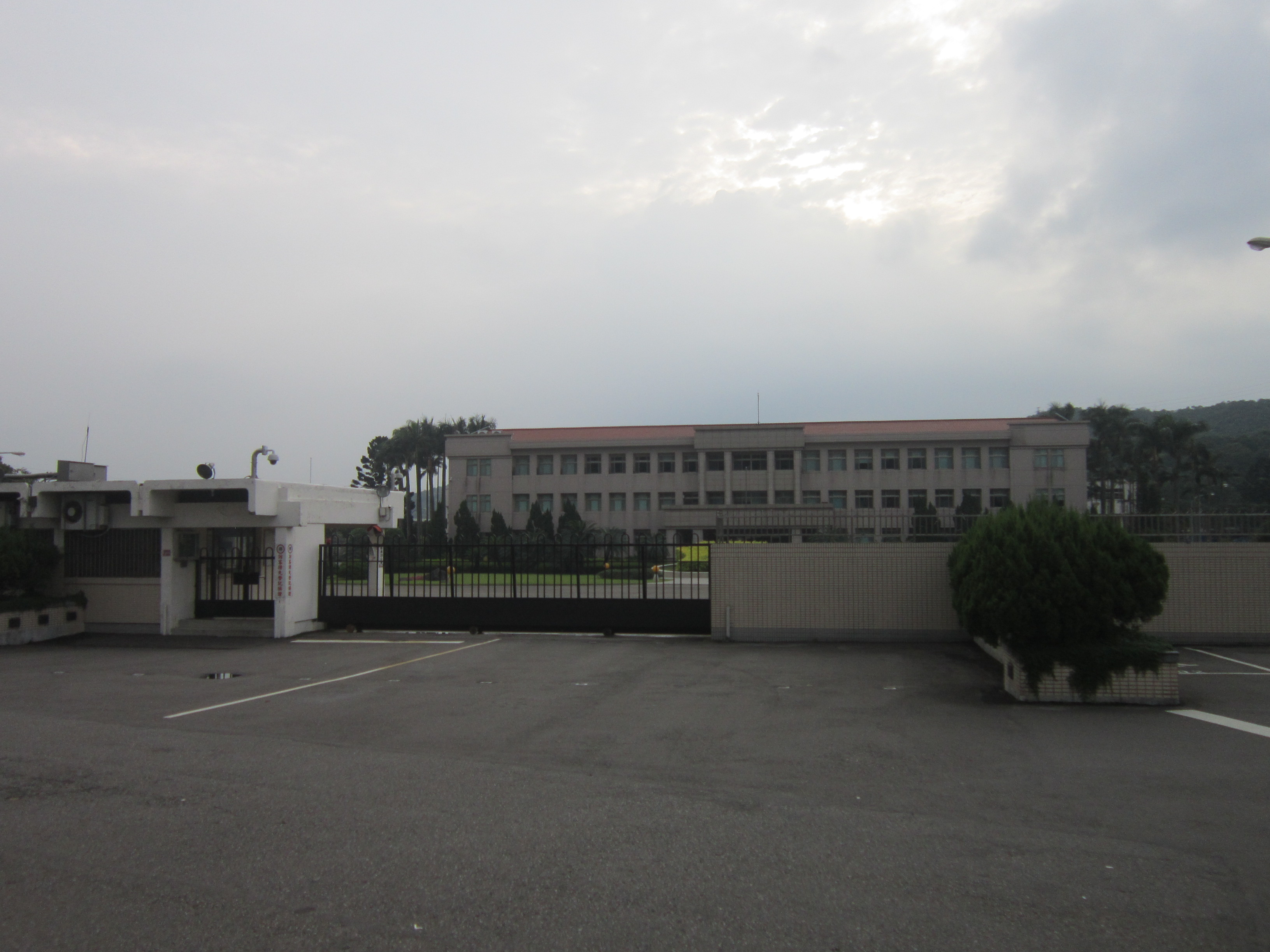 中央造幣廠，位於桃園市龜山區振興路577號。